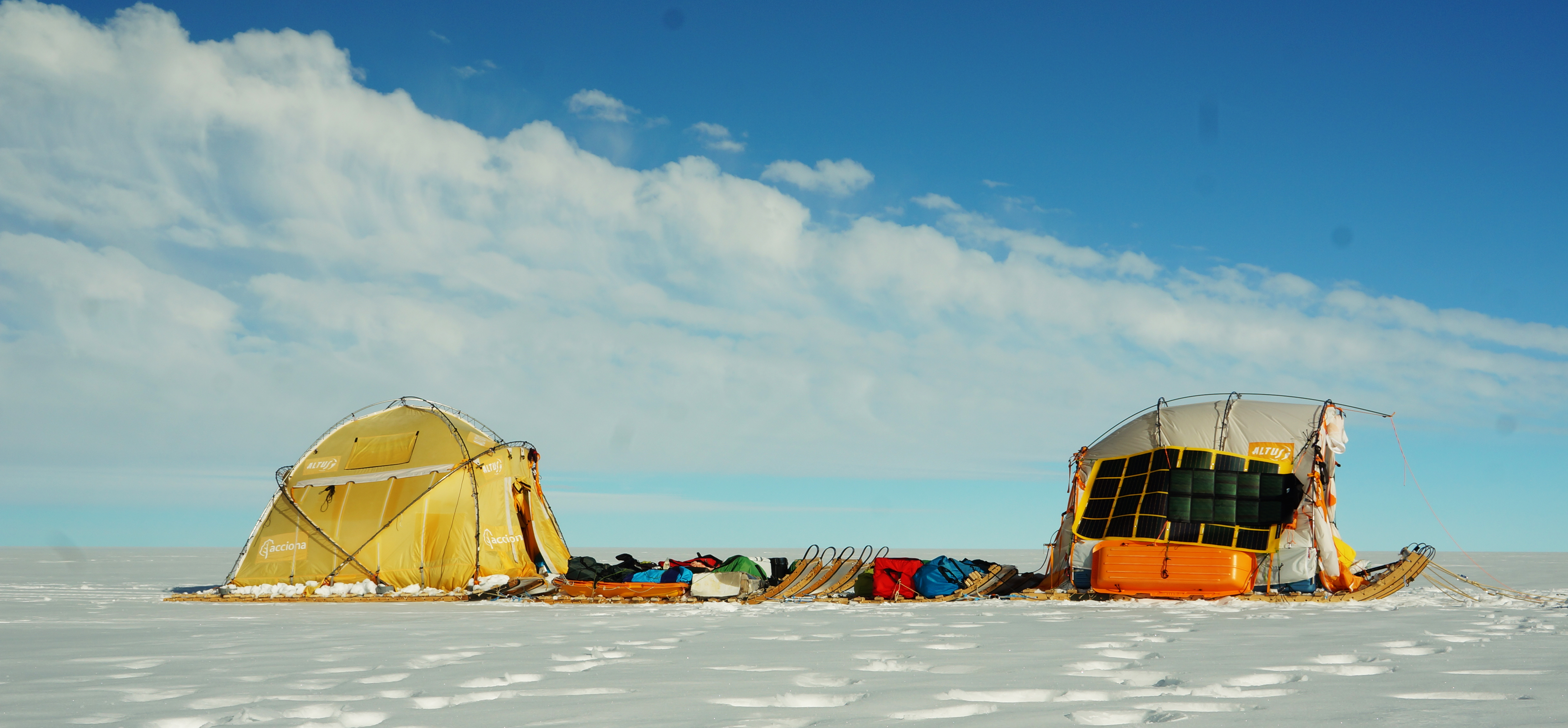 Vehículo eólico para la exploración y ciencia polar